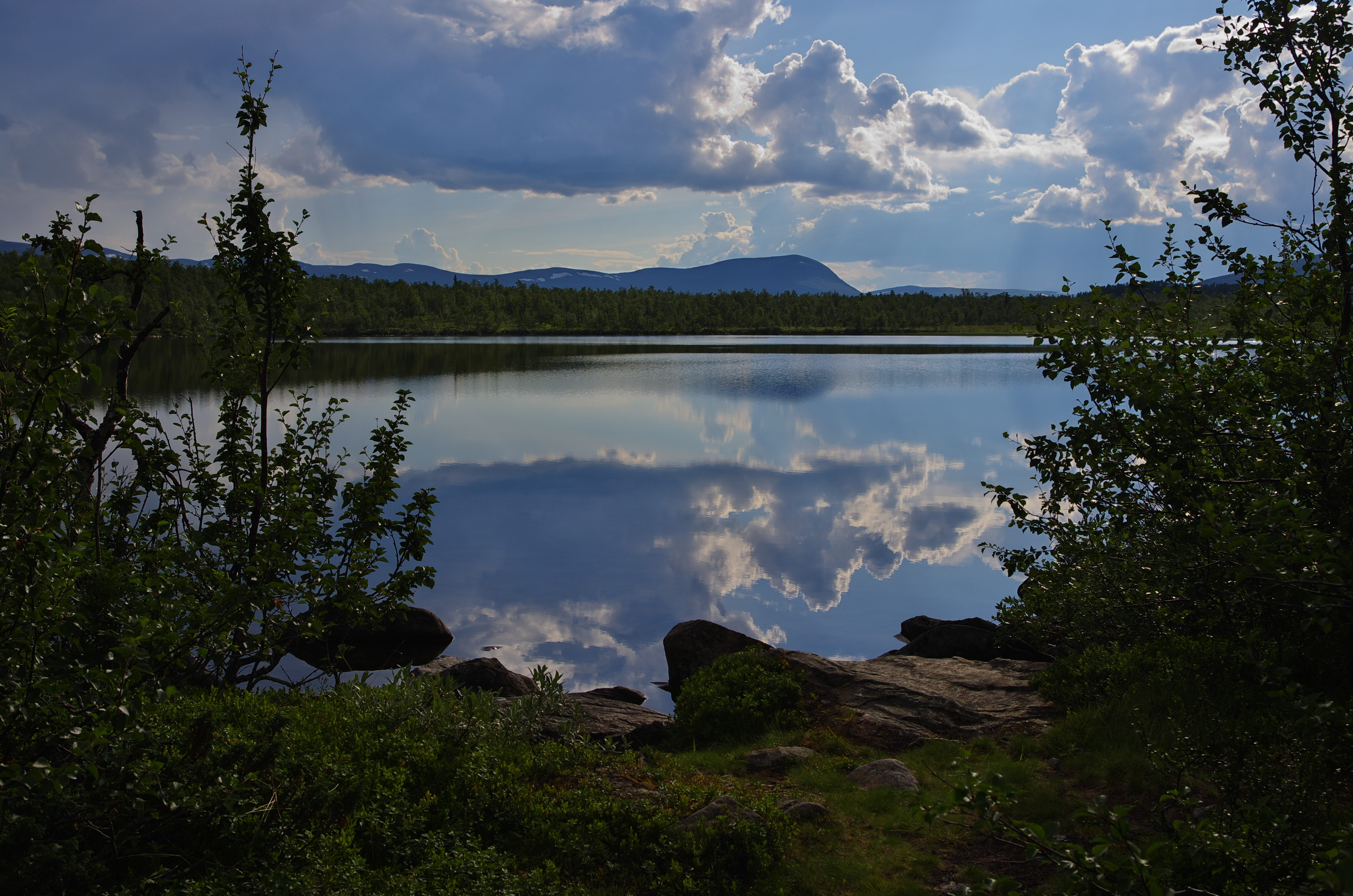 Näsbergstjärnen är en sjö 4 km nordväst om Ammarnäs i Sorsele kommun i Lappland. Kungsleden går förbi sjön.